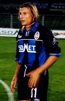 Claudio Paul Caniggia, Atalanta 1999-2000